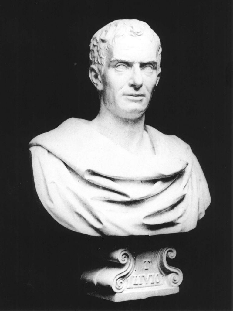 Busto di Tito Livio, opera di Lorenzo Larese Moretti (1858-1867). Il busto fa parte del Panteon Veneto, conservato presso Palazzo Loredan di Campo Santo Stefano a Venezia.